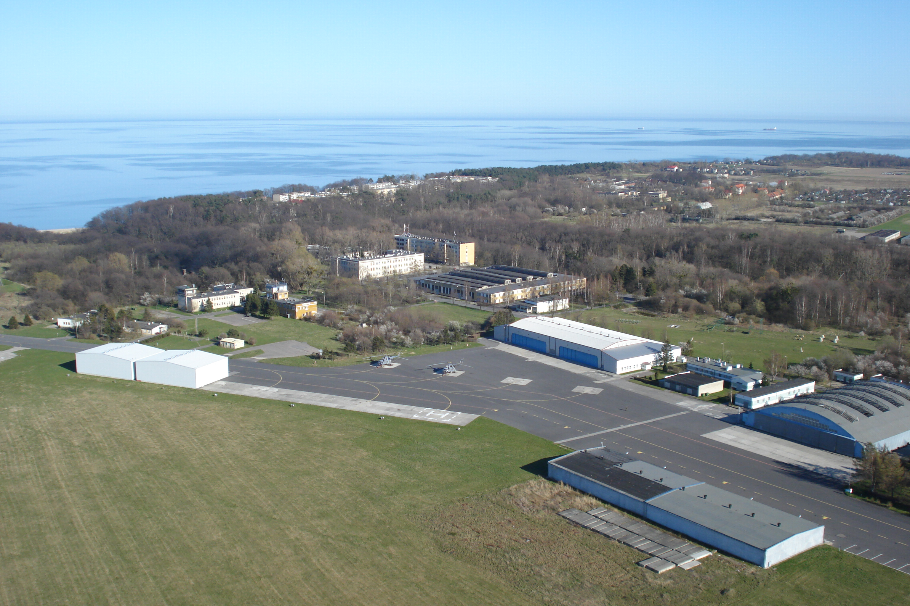 Gdynia z "lotu ptaka"